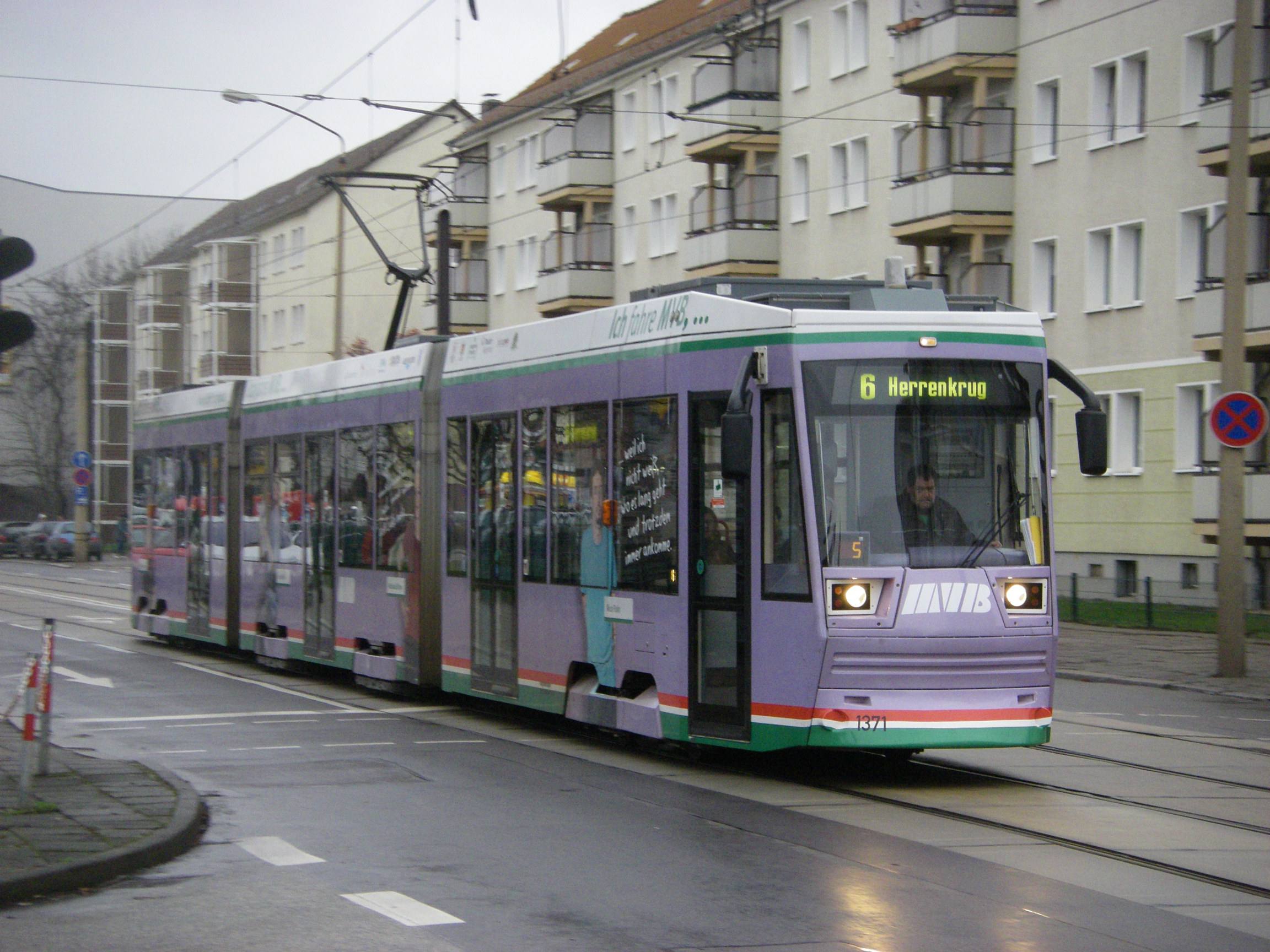 Magdeburg, Straßenbahn Nr. 1371 auf der Linie 6 Große Diesdorfer Straße, fotografiert von der Ecke mit dem Annaweg in Blickrichtung Nordwesten